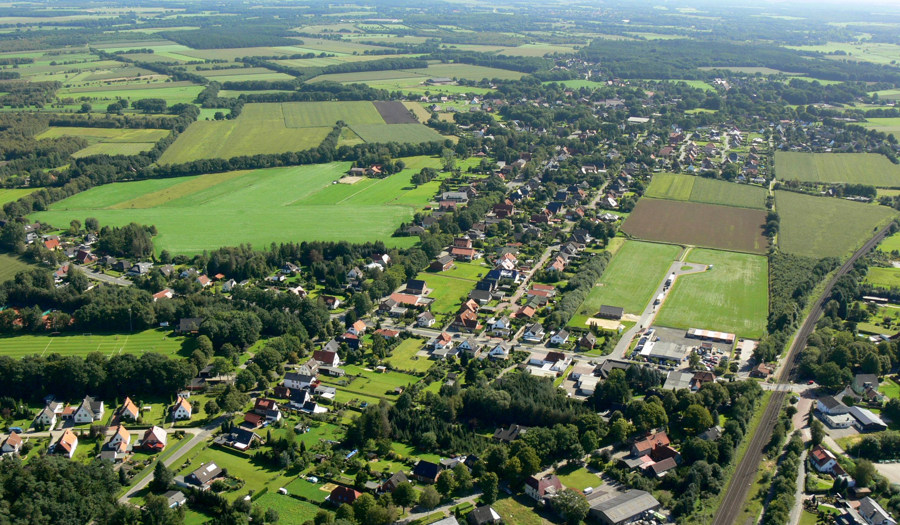 Luftbild von Lunestedt aus Westen